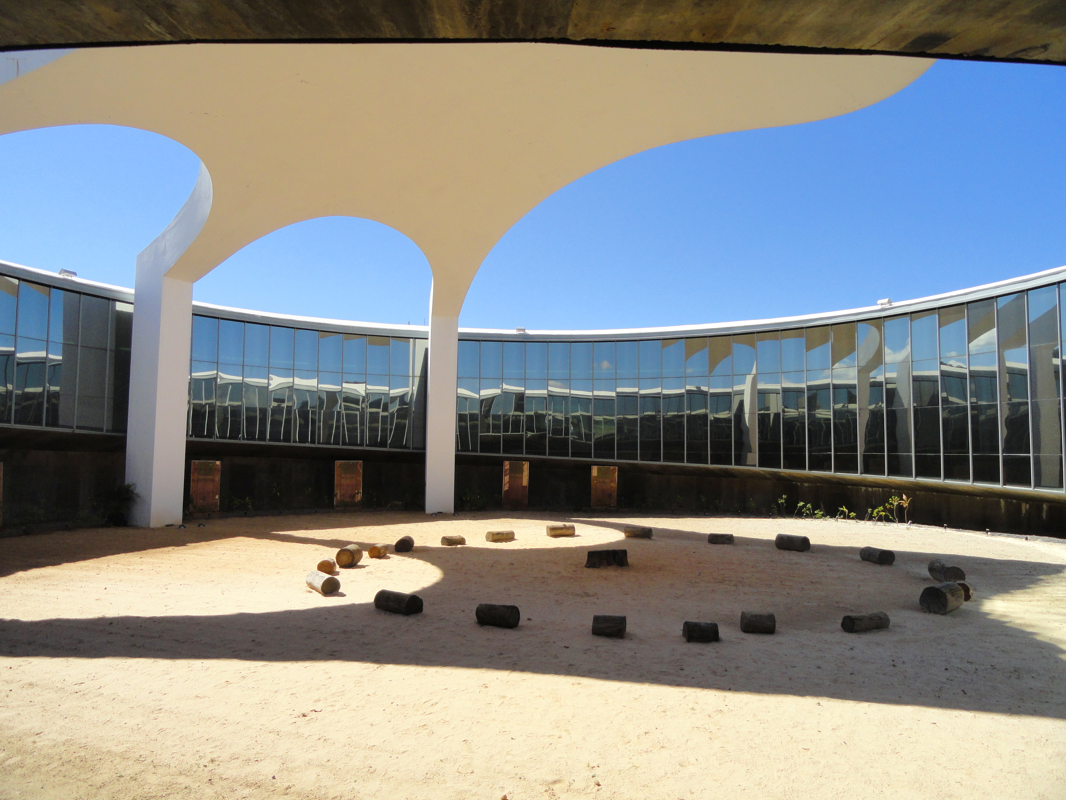 Memorial dos Povos Indígenas, Brasília, Brazil.